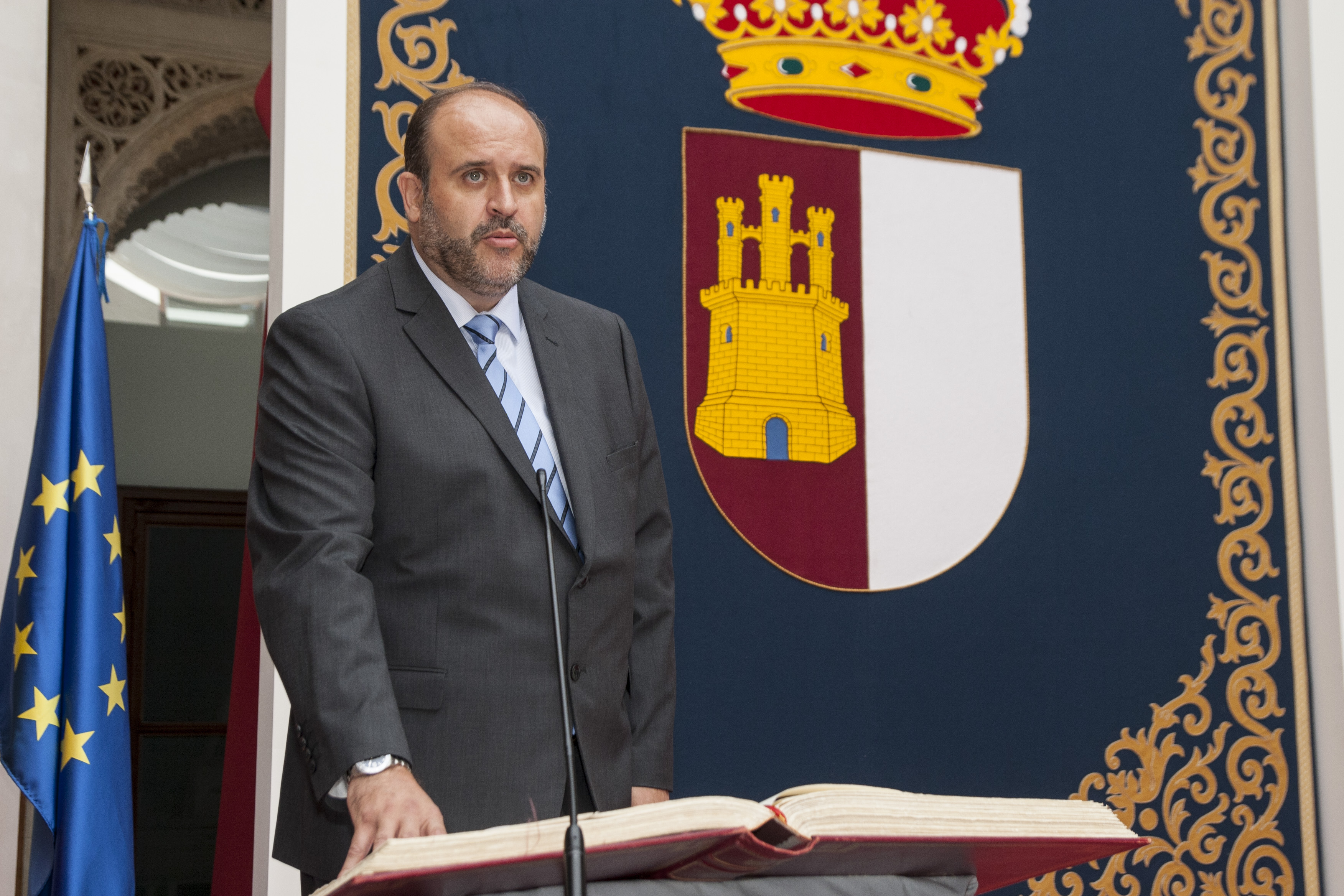 Acto de toma de posesión de los nuevos miembros del Consejo de Gobierno de Castilla-La Mancha.